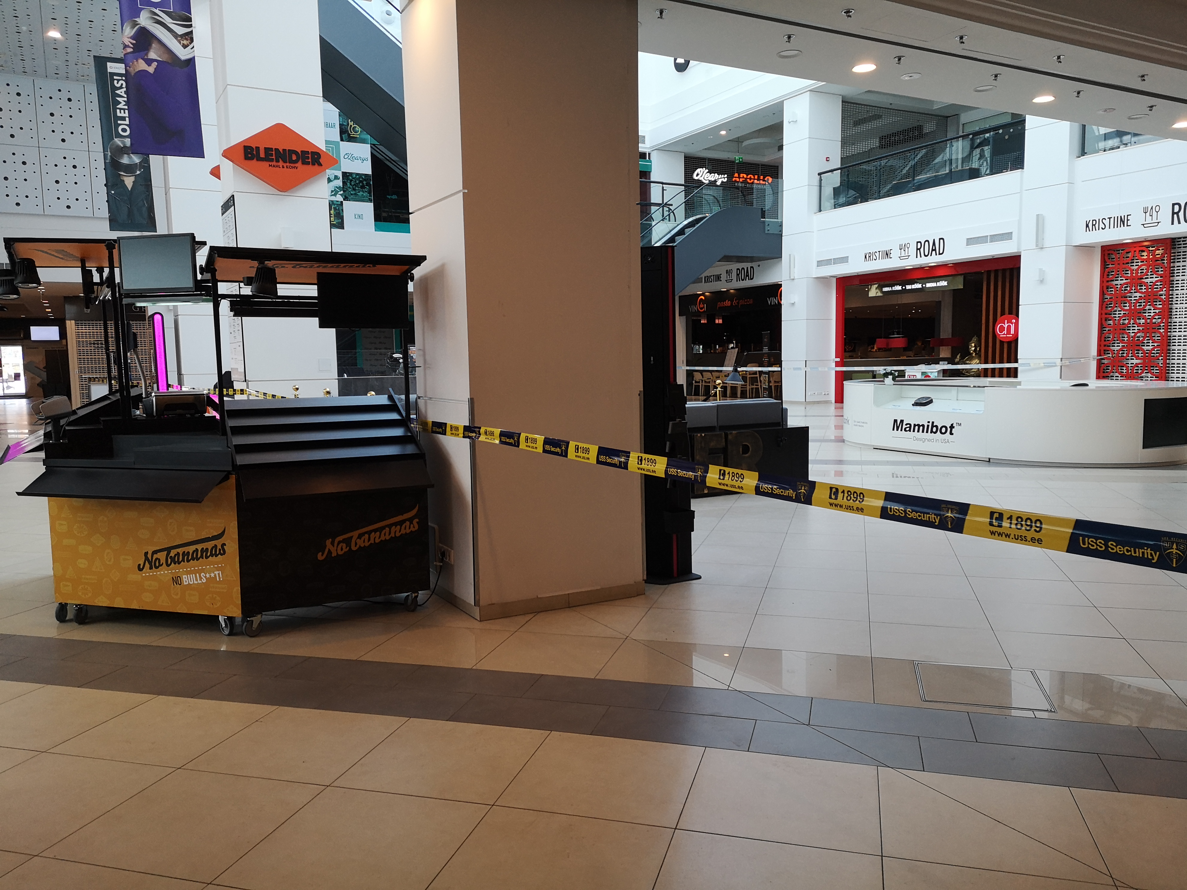 Atmosfäär Kristiine Keskuses COVID-19 eriolukorra ajal